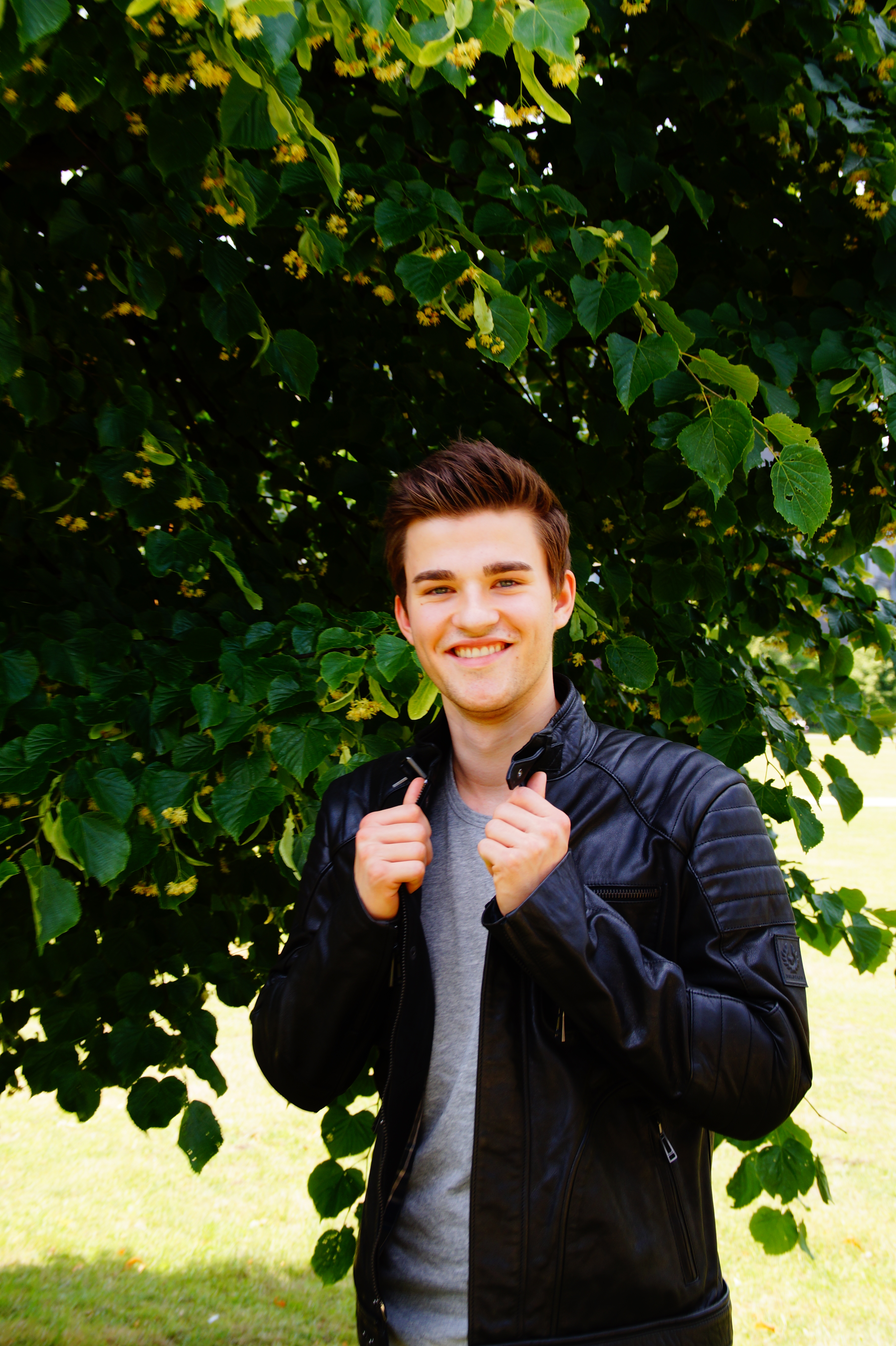 Pressetermin Comedy-Serie „Die Kuhflüsterin" am 25. Juni 2015 im Kölner Filmhaus